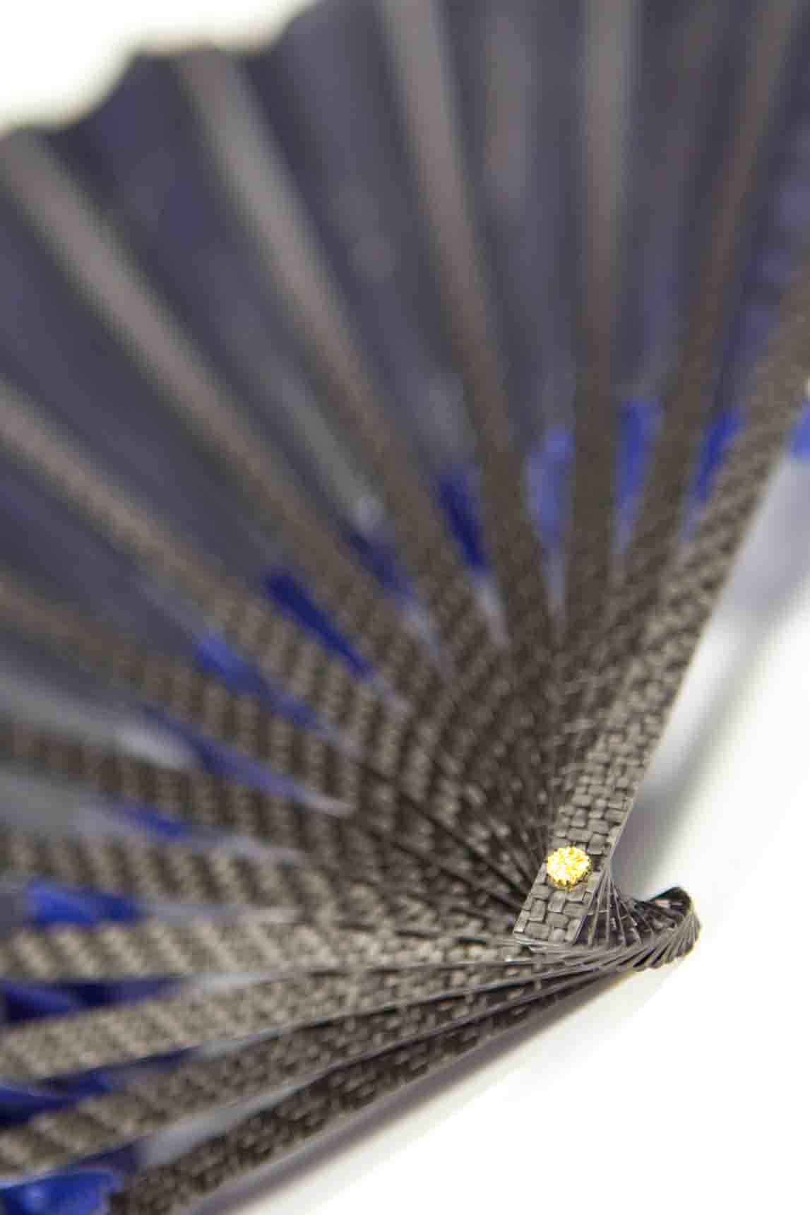 Eventail en carbone et organza, vu de dos.